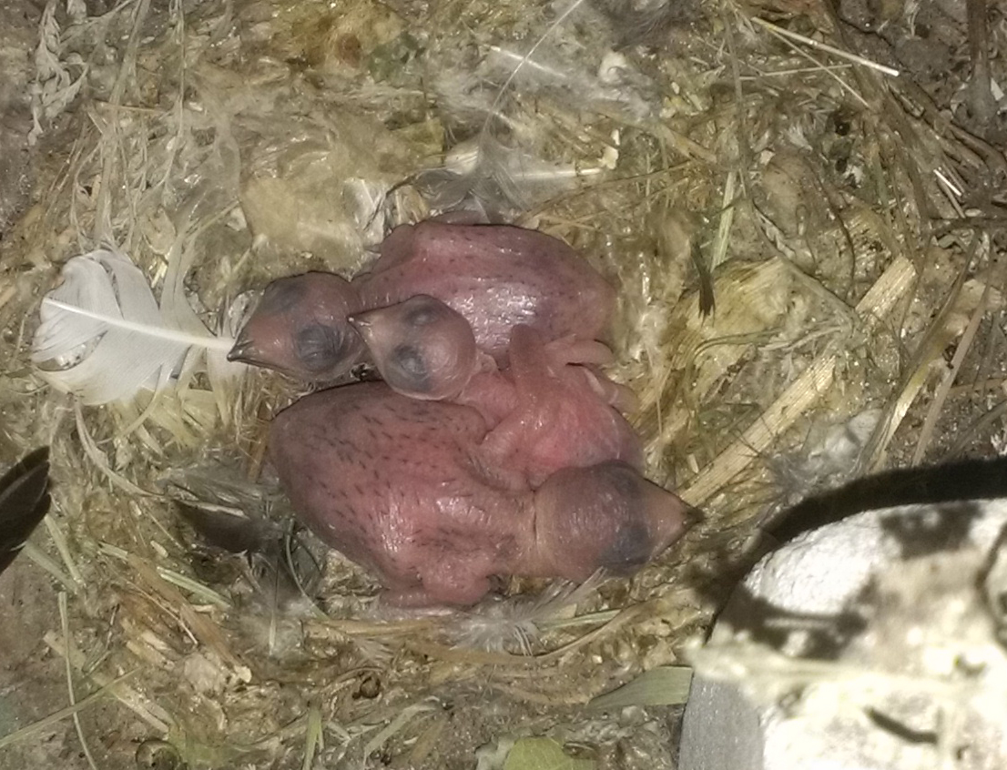 Птенцы чёрного стрижа Apus apus в гнезде